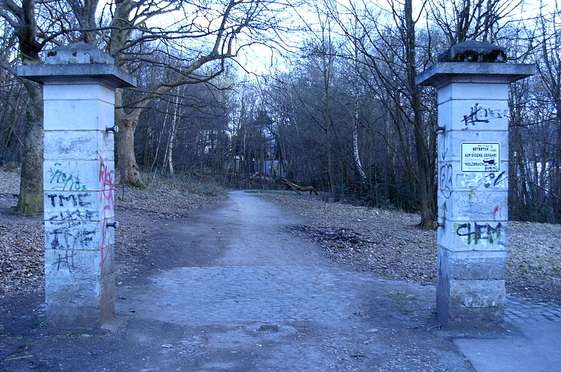 Reste des ehemaligen Kupferhofes Blankenberg in Stolberg Rhld.